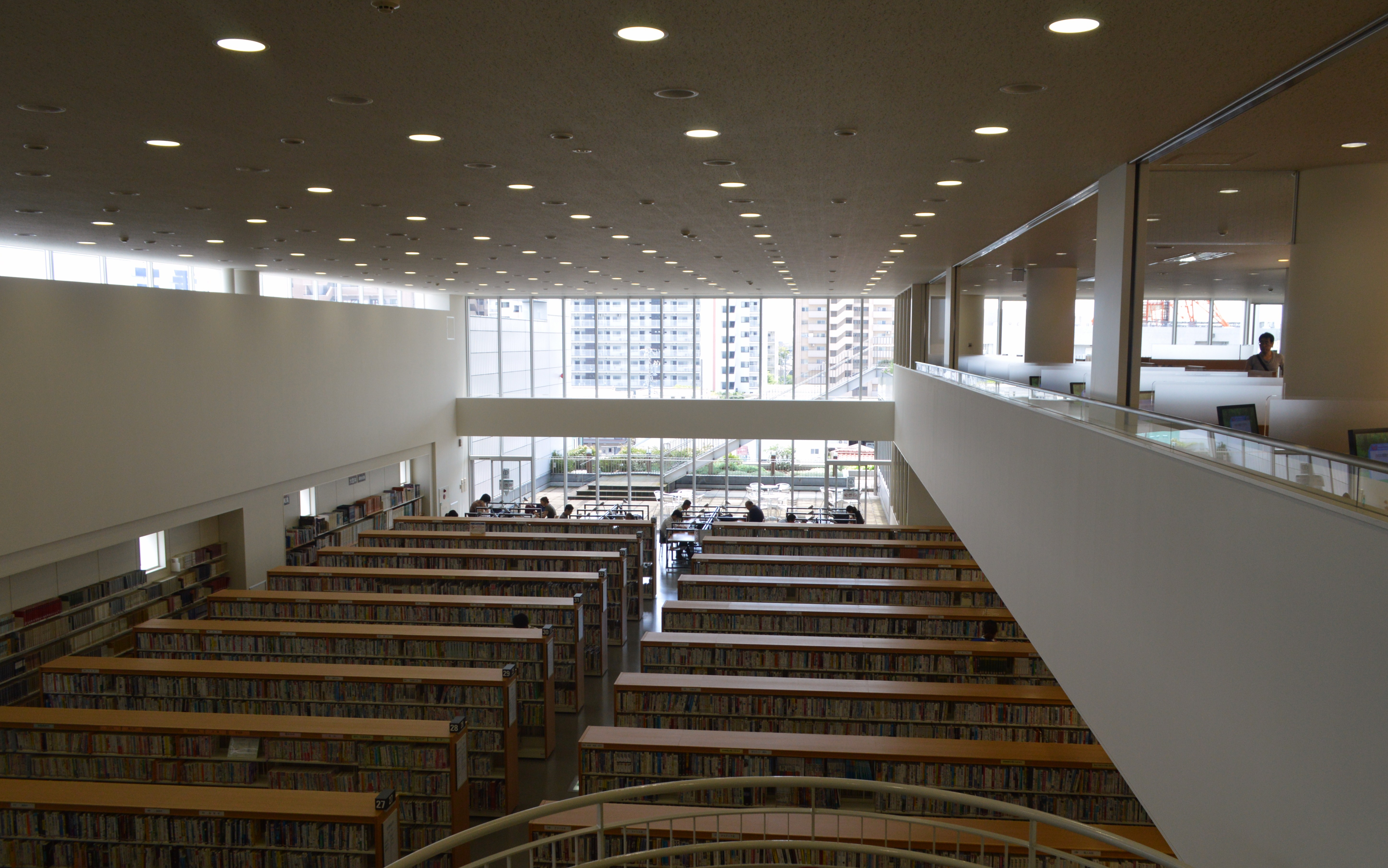 桑名市立中央図書館3階の一般閲覧スペース